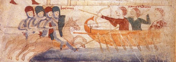 Češi